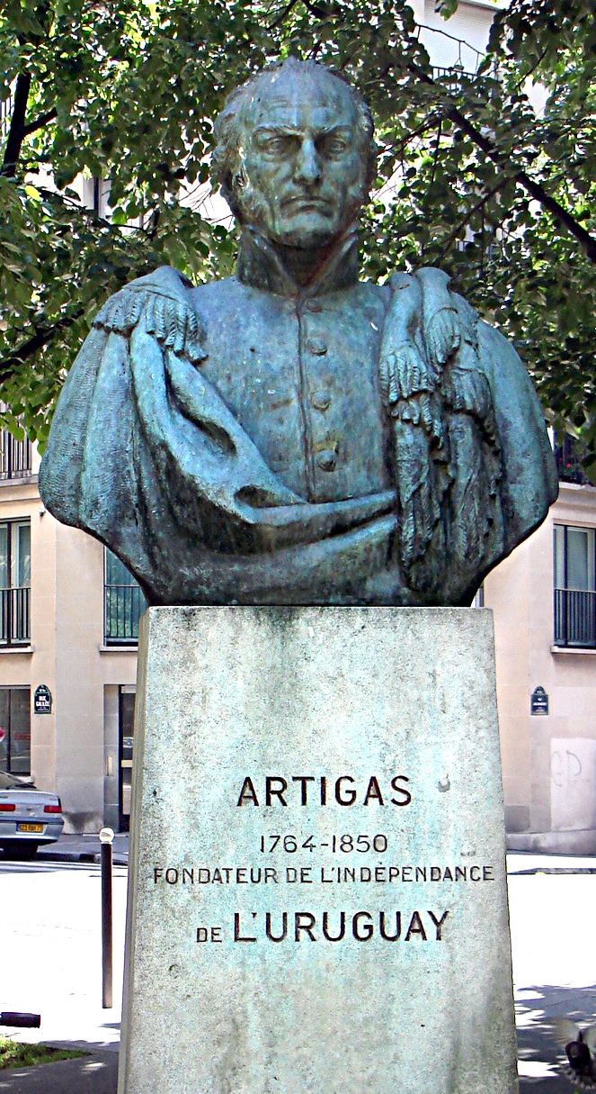 Monumentul lui José Gervasio Artigas la Paris